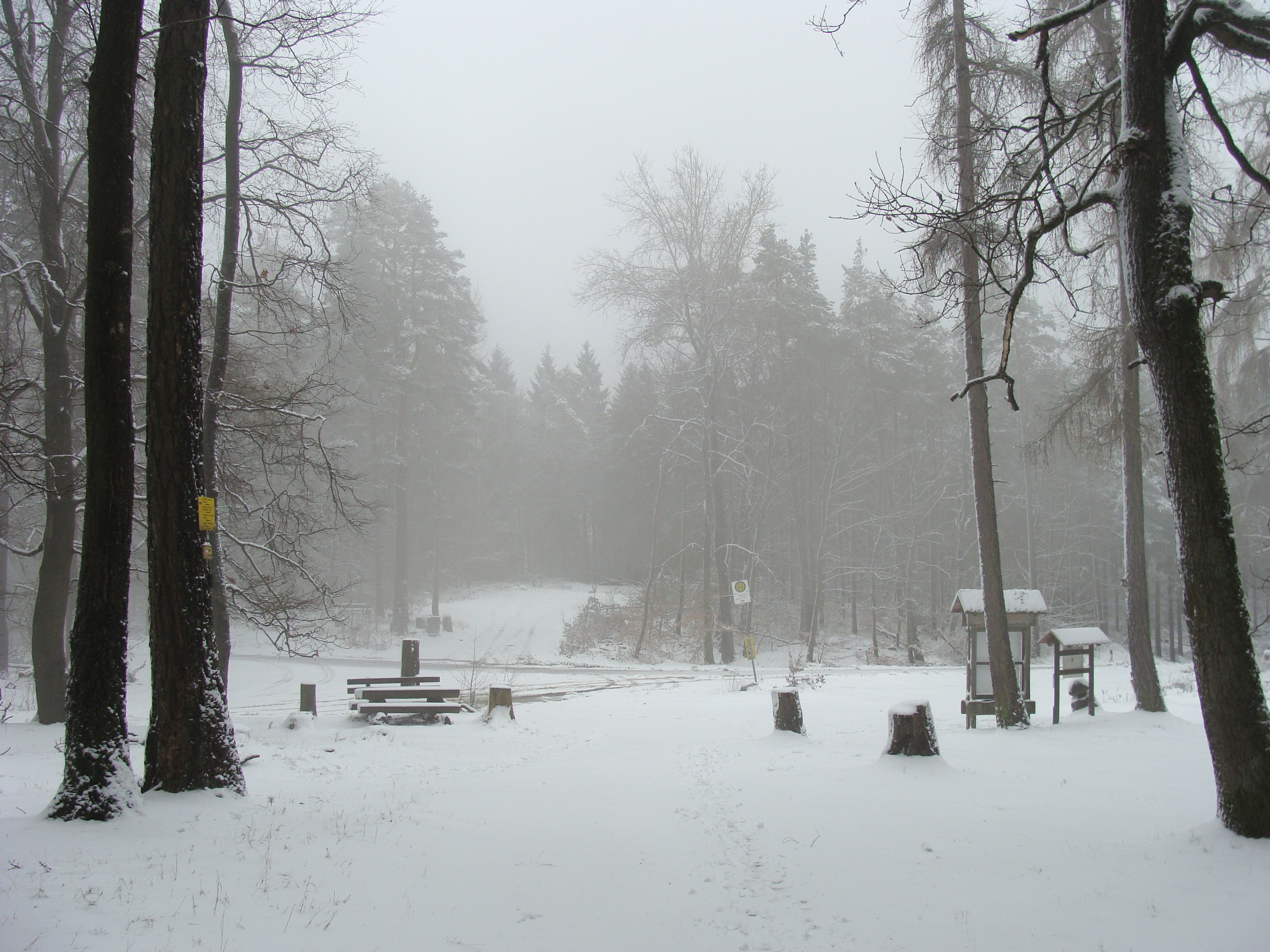 Lolosruhe im Winter